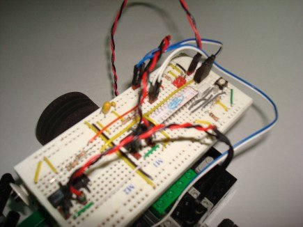 Pequeño robot creado con Logochip.